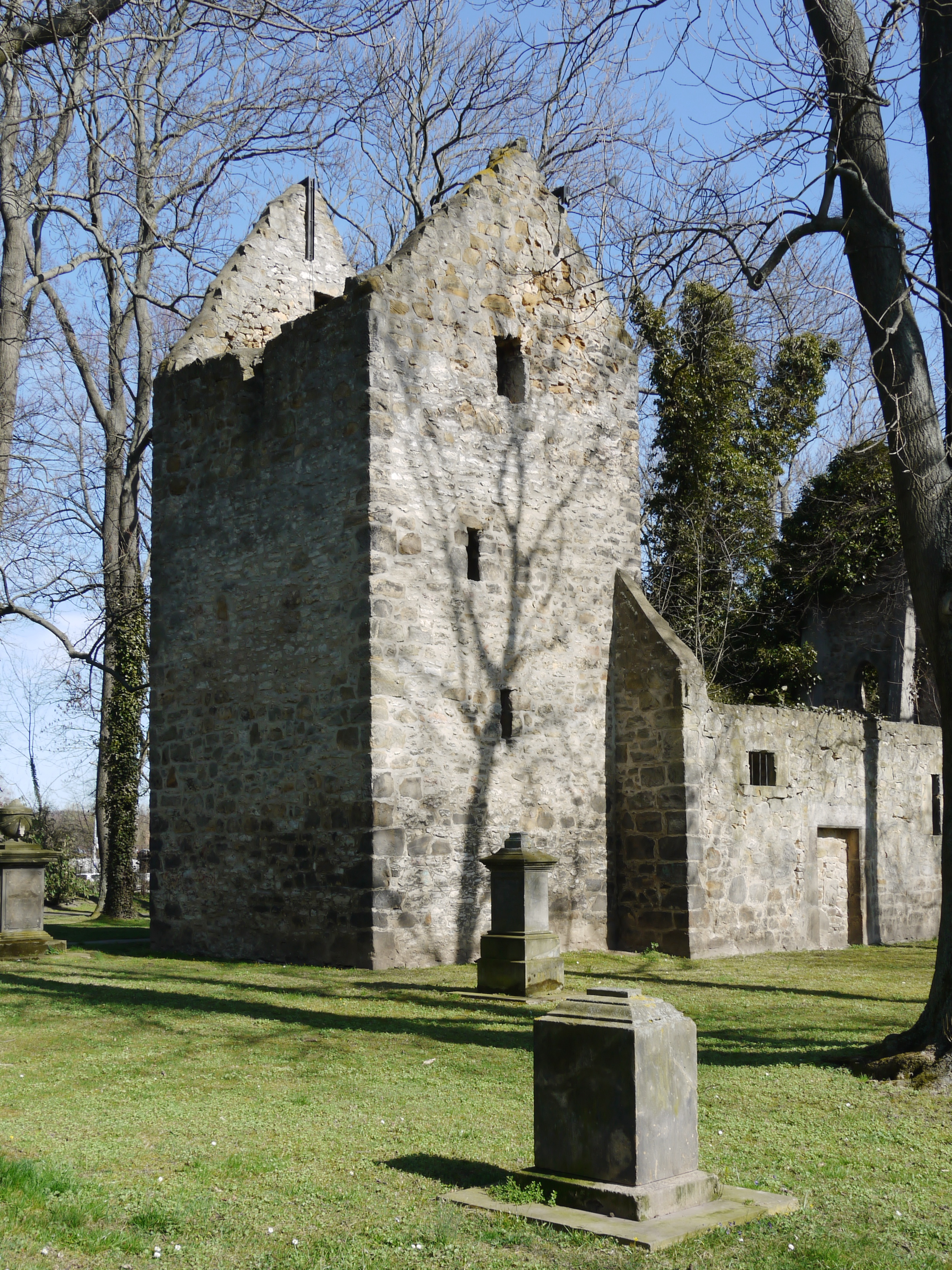 Ruine der im 12. Jahrhundert erstmals erwähnten Jakobus-Kirche. Die Kirche gehörte damals zur Gemeinde Vöppstedt (auch Veppstedt genannt), das auf dem Gebiet des heutigen Salzgitter-Bad lag. Sie wird heute landläufig als Vöppstedter Ruine bezeichnet.